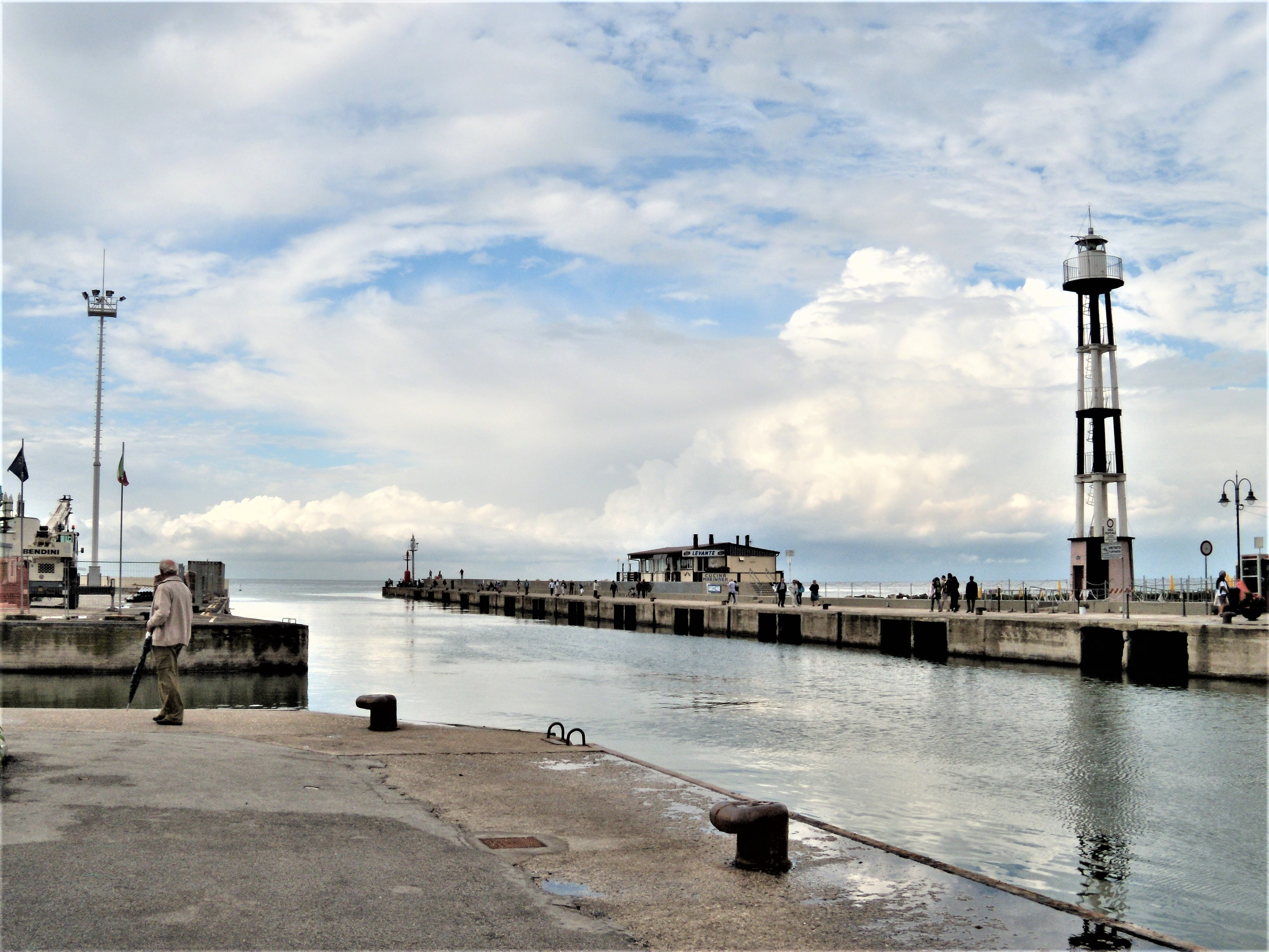 L'ultimo tratto del Tavollo, convogliato in un porto canale artificiale nel Mar Adriatico, osservato dalla sponda cattolichina.